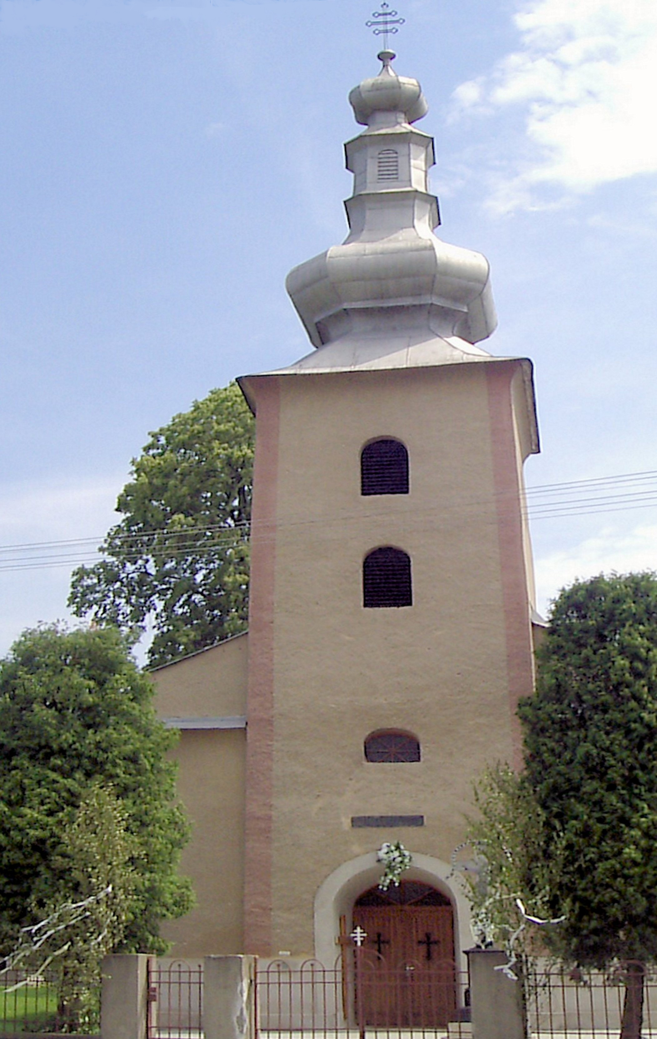 Miňovce, Grécko-katolícky kostol